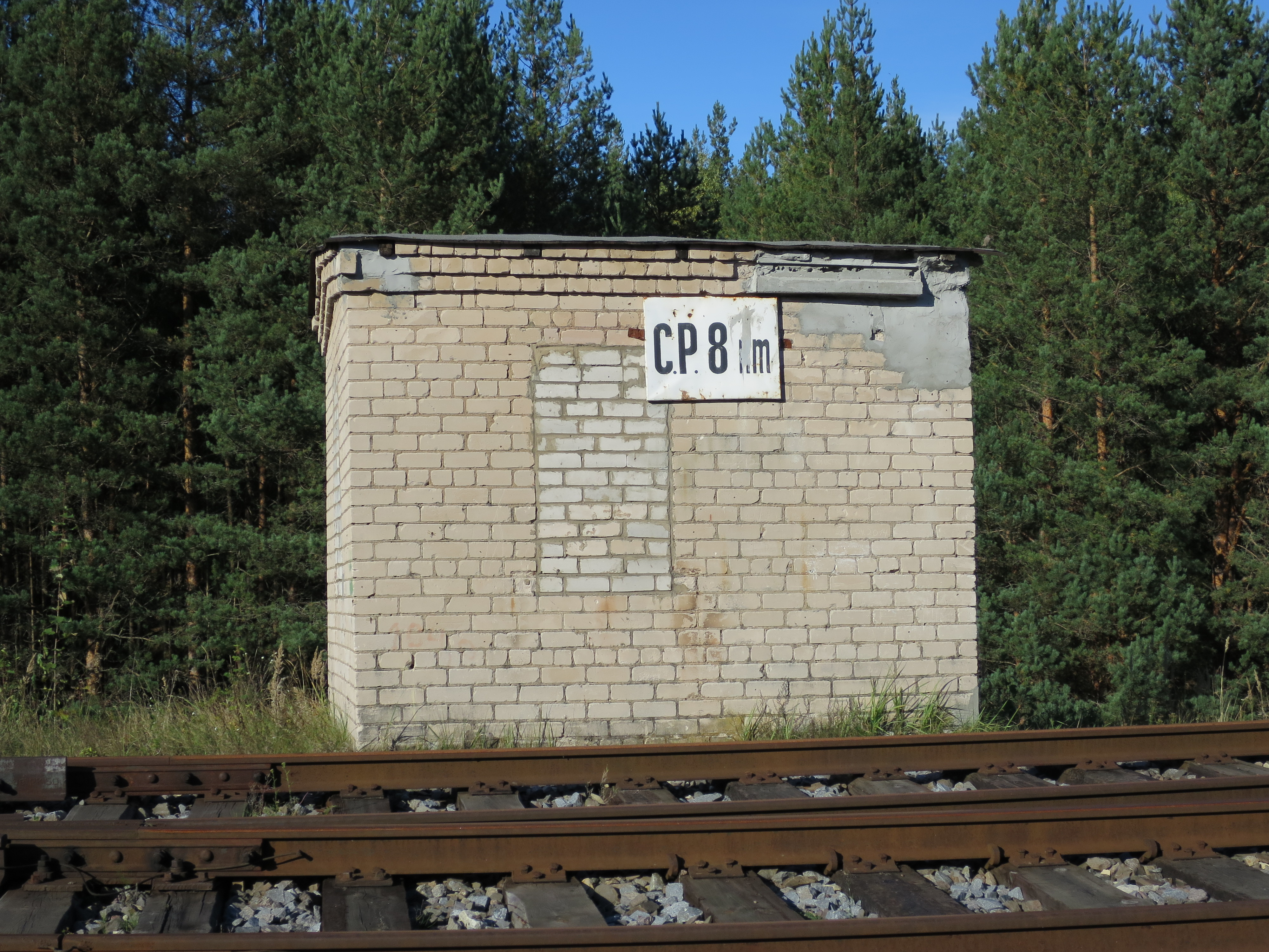 8. kilometra posteņa ēka